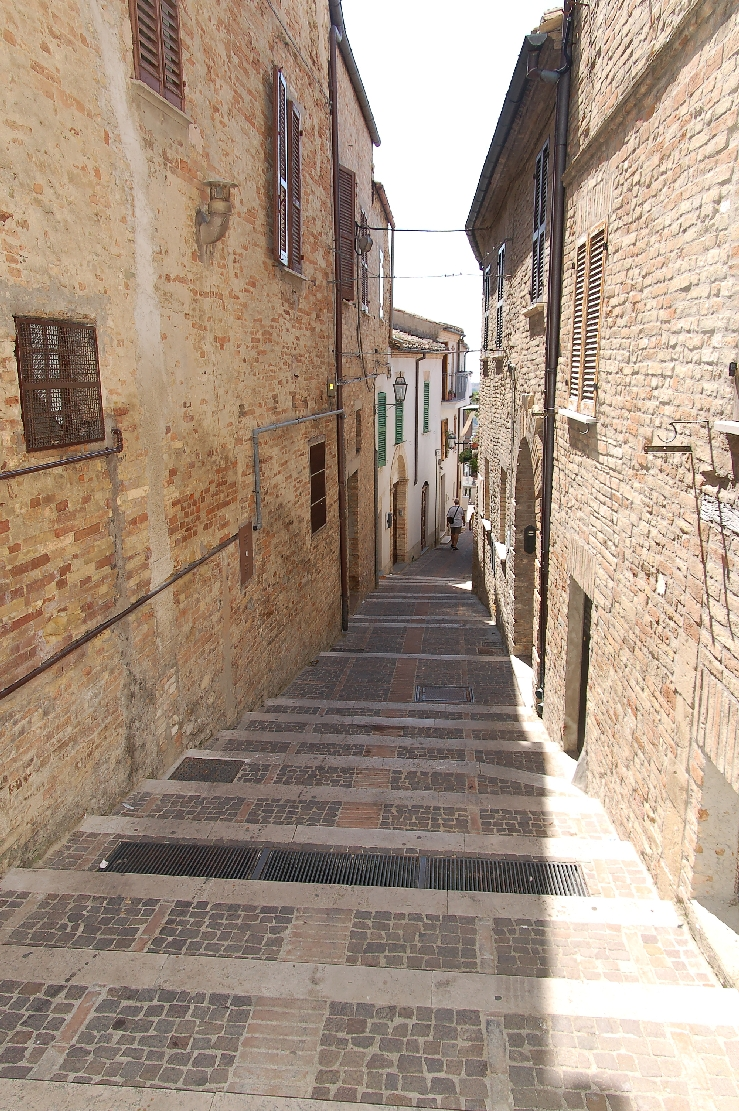 Atri 2011